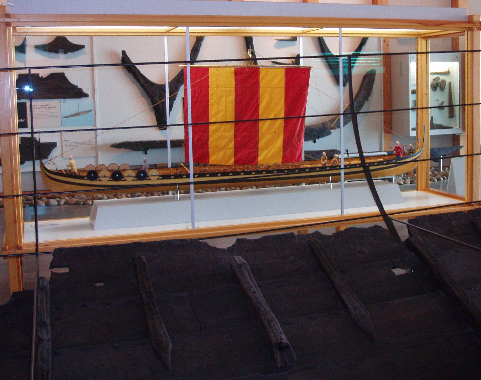 Modell des Wikingerlangschiffs in Haithabu